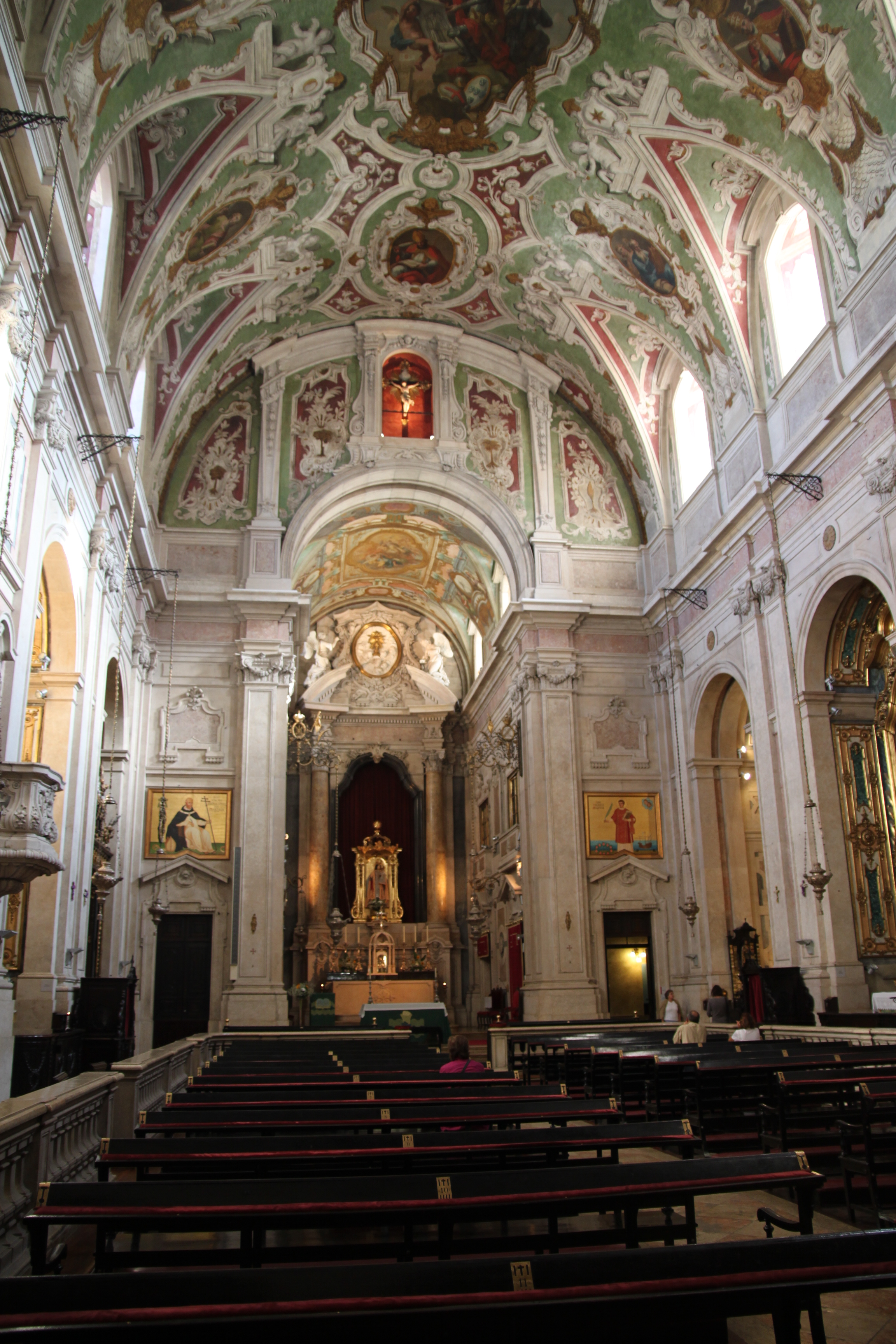 Igreja de Nossa Senhora dos Mártires This file was uploaded for Wiki Loves Monuments in Portugal with the unique identifier 74983.